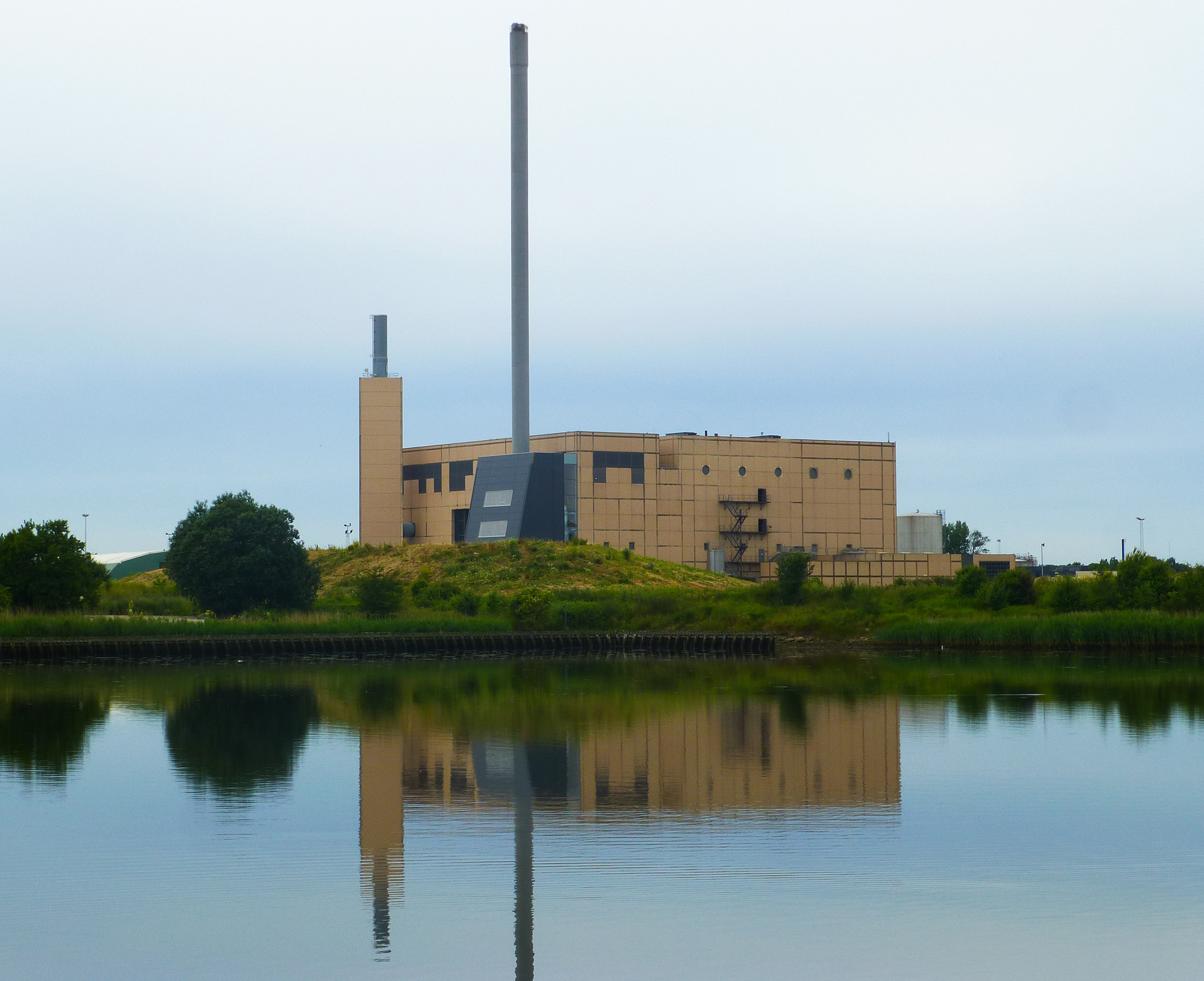 Horsens Kraftvarmevaerk syd for Bygholm Å i Horsens